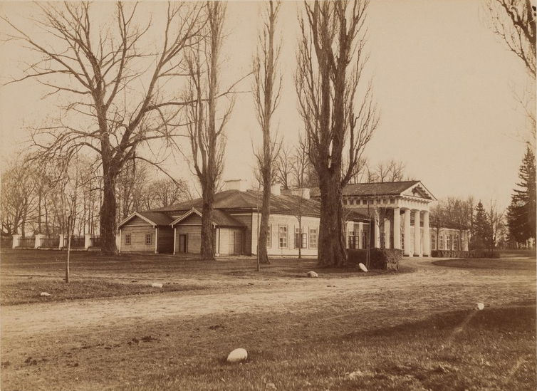 Беларуская (тарашкевіца): Радзівілімонты (Radzivilimonty), палац Радзівілаў (Radzivił)